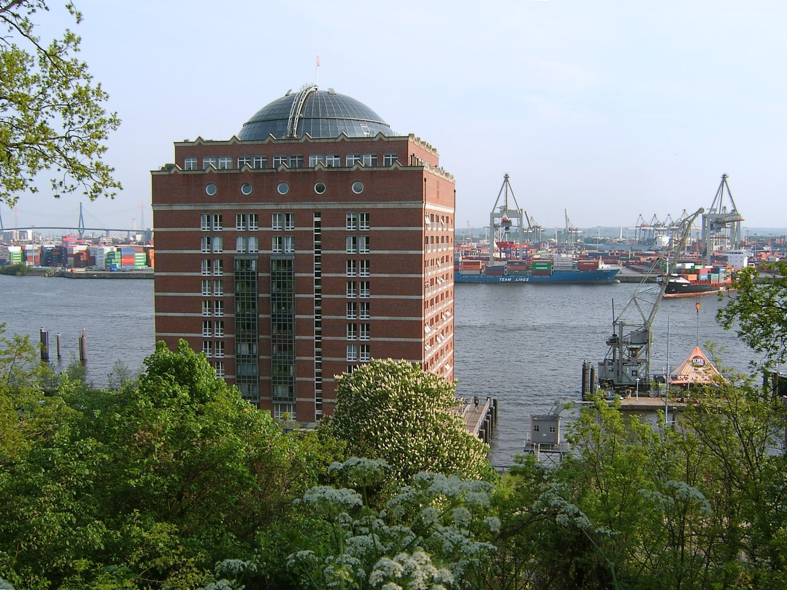 Bilder aus Hamburg. Aufnahme vom Nordufer über die Elbe in Richtung Süden. Das ehemalige Union-Kühlhaus ist heute das Seniorenstift „Augustinum Hamburg“ im Ottenser Teilort Neumühlen; das rote Backsteingebäude mit der Glaskuppel wurde von der Architektensozietät Gerkan, Marg und Partner im Stil eines Speicherbaus umgeplant und ist eines der 22 Seniorenstifte des gleichnamigen deutschen sozialen Dienstleistungsunternehmens Augustinum.